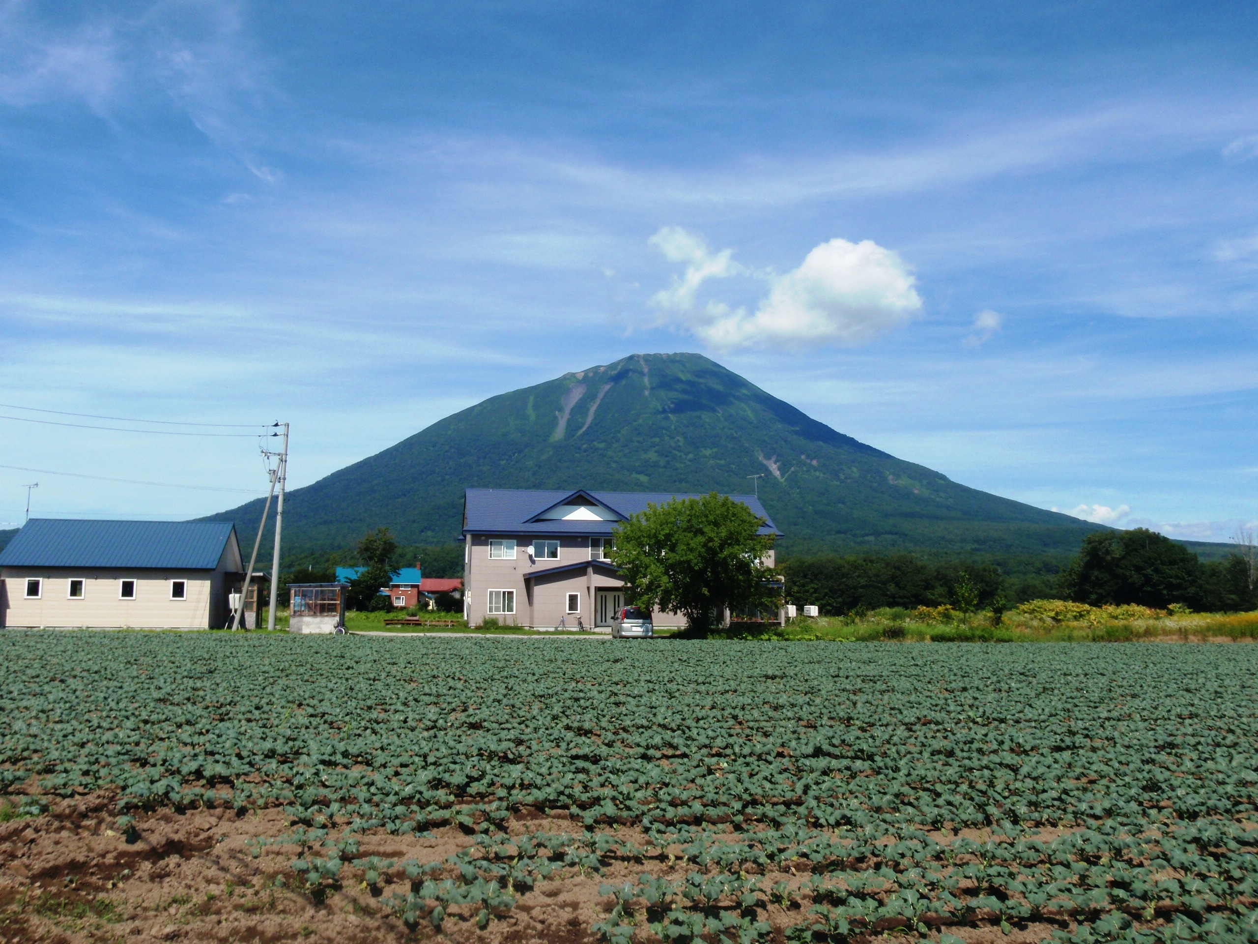 まっかりユースホステル、バックは羊蹄山。